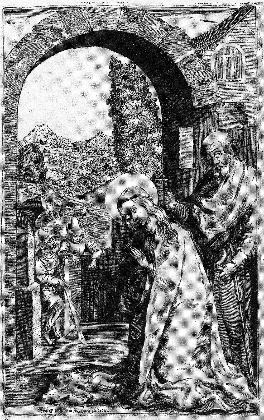 Sancta Maria de Victoria aus Stenovitz